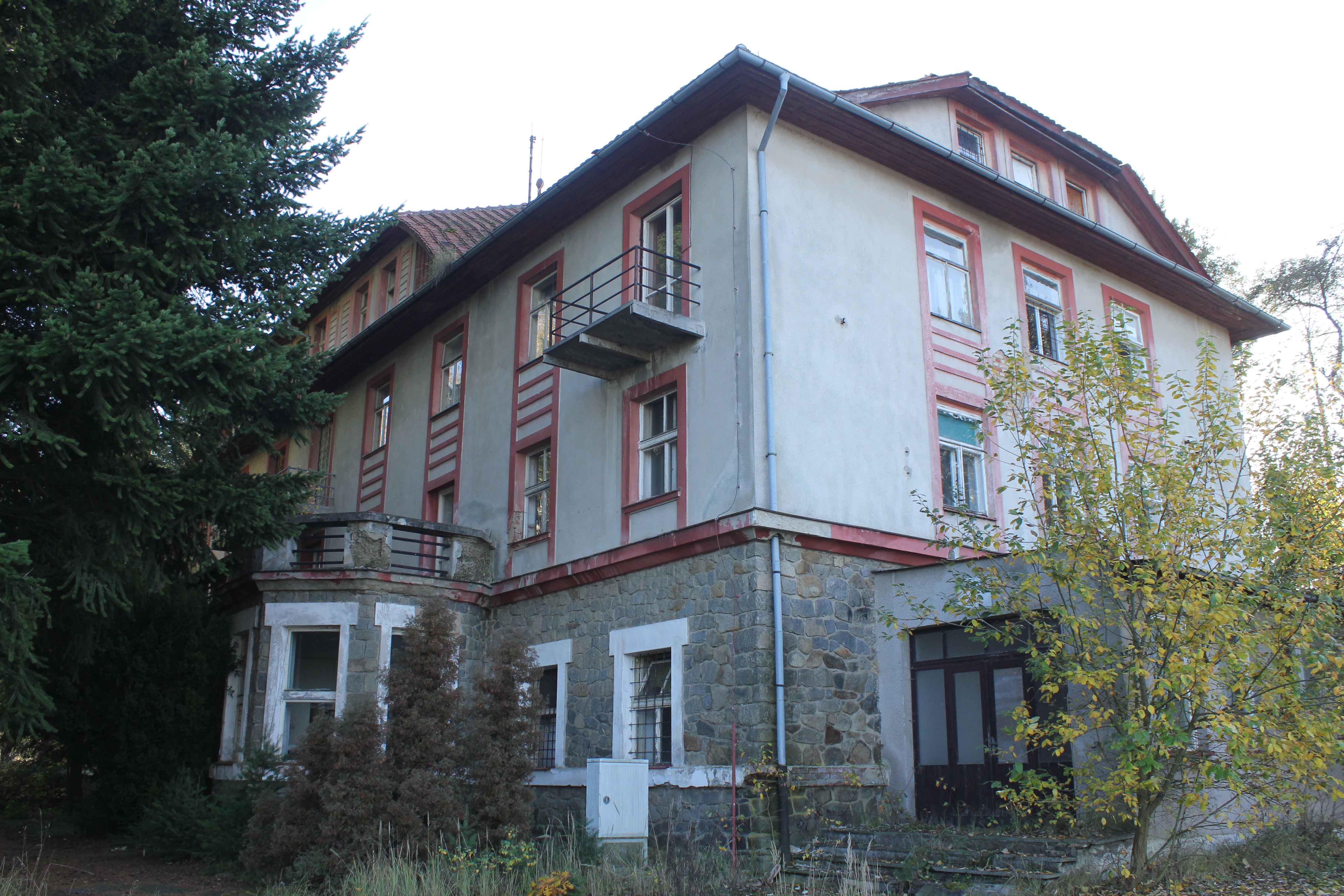 Penzion Třemšín, říjen 2019